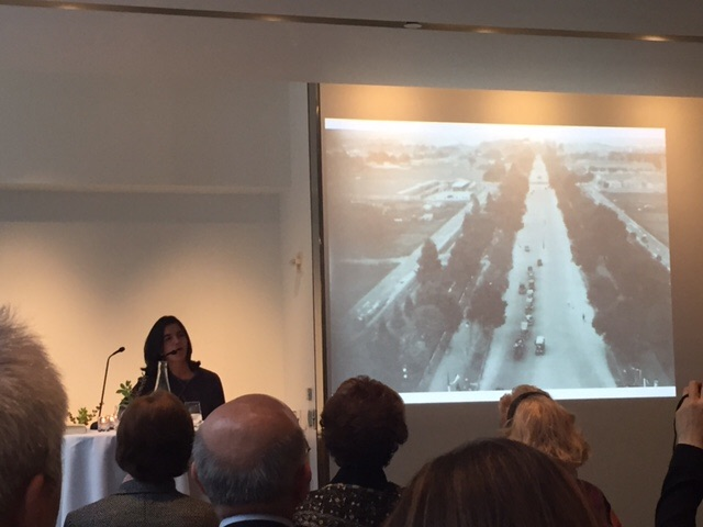 Fernanda Canales presentando su libro en el MoMA de NY